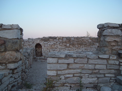 Canne della Battaglia anno:2007